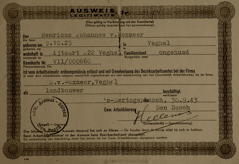 'Ausweis', afgegeven op 30 september 1943